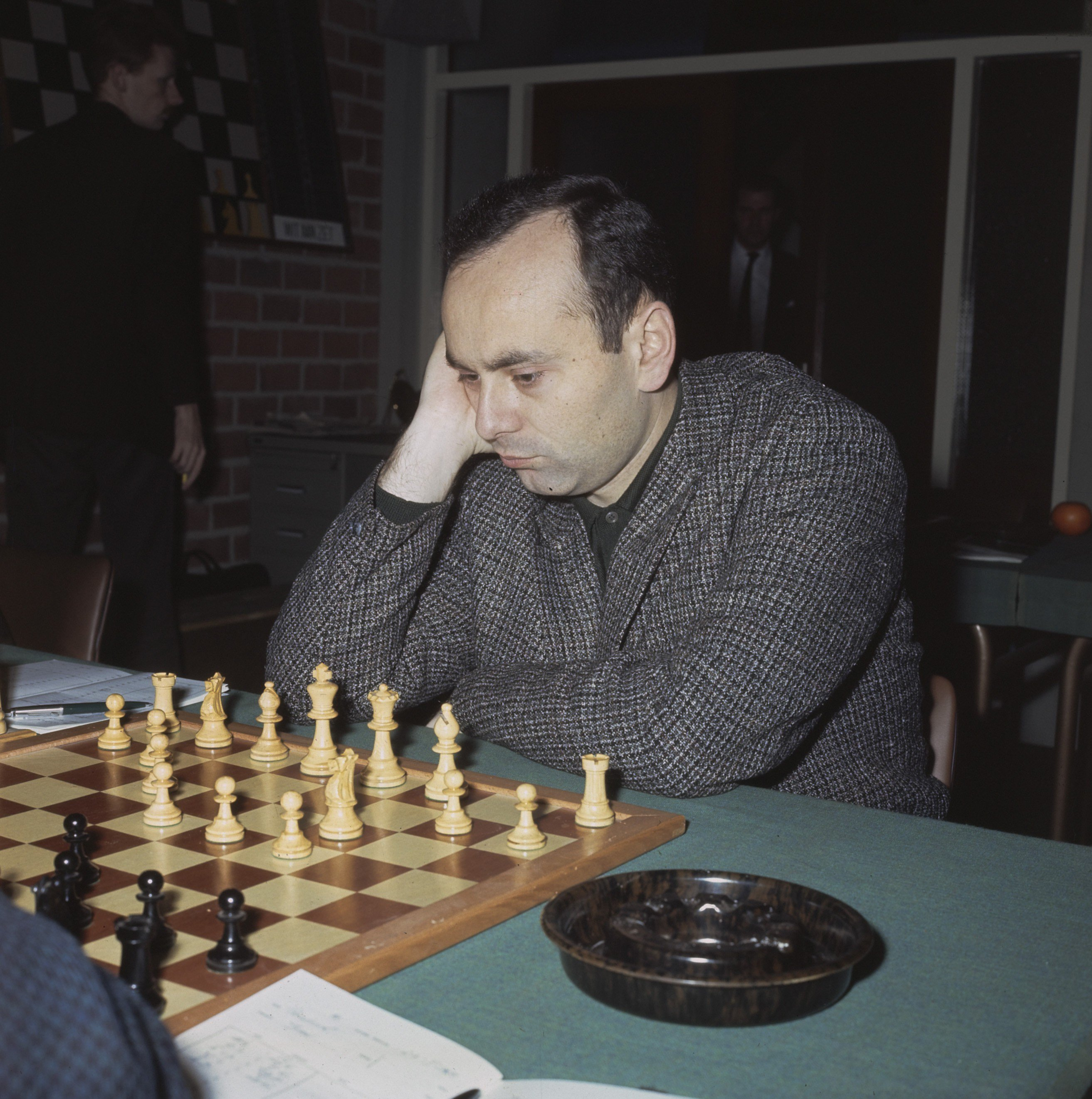 Collectie / Archief : Fotocollectie Anefo Reportage / Serie : [ onbekend ] Beschrijving : Hoogovenschaaktoernooi te Beverwijk; Portisch, Hongarije Datum : 5 januari 1968 Locatie : Beverwijk Trefwoorden : schaken Instellingsnaam : Hoogovenschaaktoernooi Fotograaf : Koch, Eric / Anefo Auteursrechthebbende : Nationaal Archief Materiaalsoort : Dia (kleur) Nummer archiefinventaris : bekijk toegang 2.24.01.07 Bestanddeelnummer : 254-7969